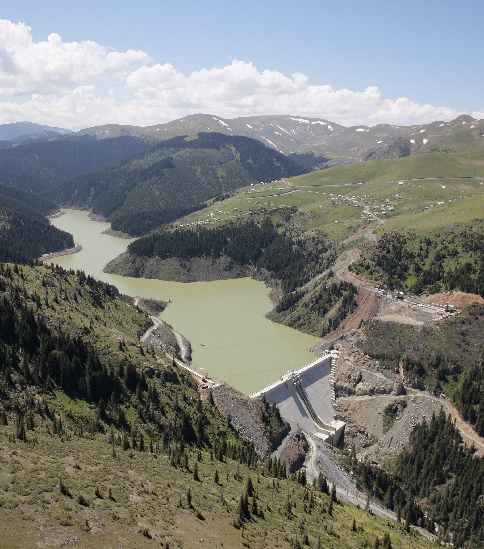 Yaşmaklı Barajı